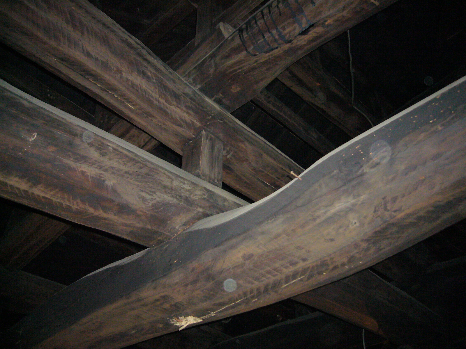 beam,old-japanese-house,hari,edo-jidai-no-ie,katori-city,japan